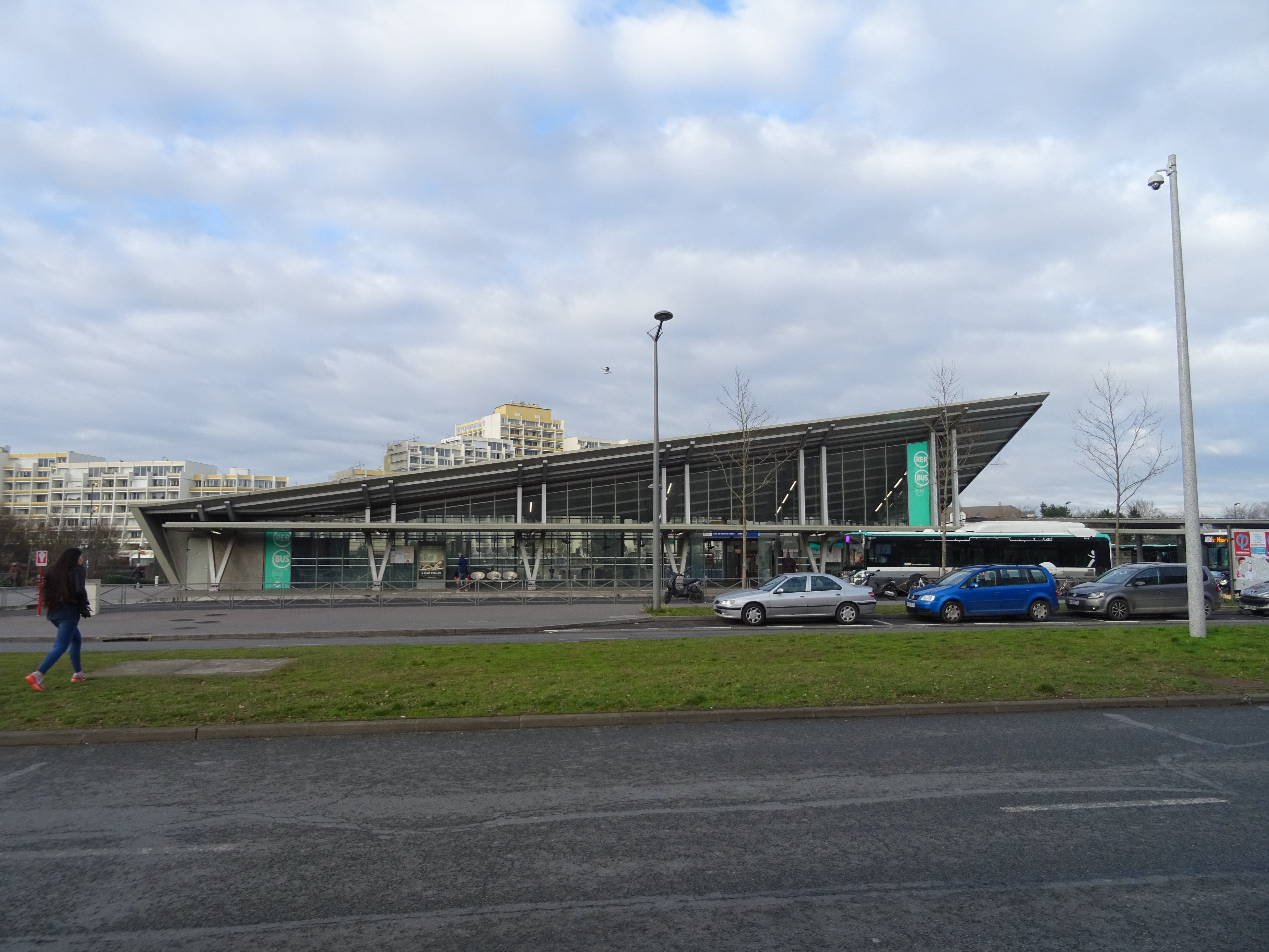 Bâtiment extérieur de la gare RER A de Noisy-le-Grand-Mont-d'Est